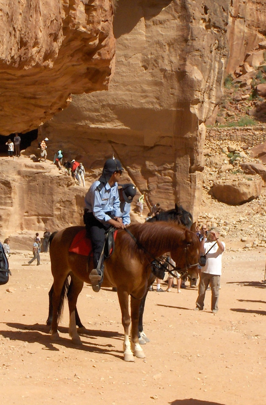 Polizia a cavallo a Petra